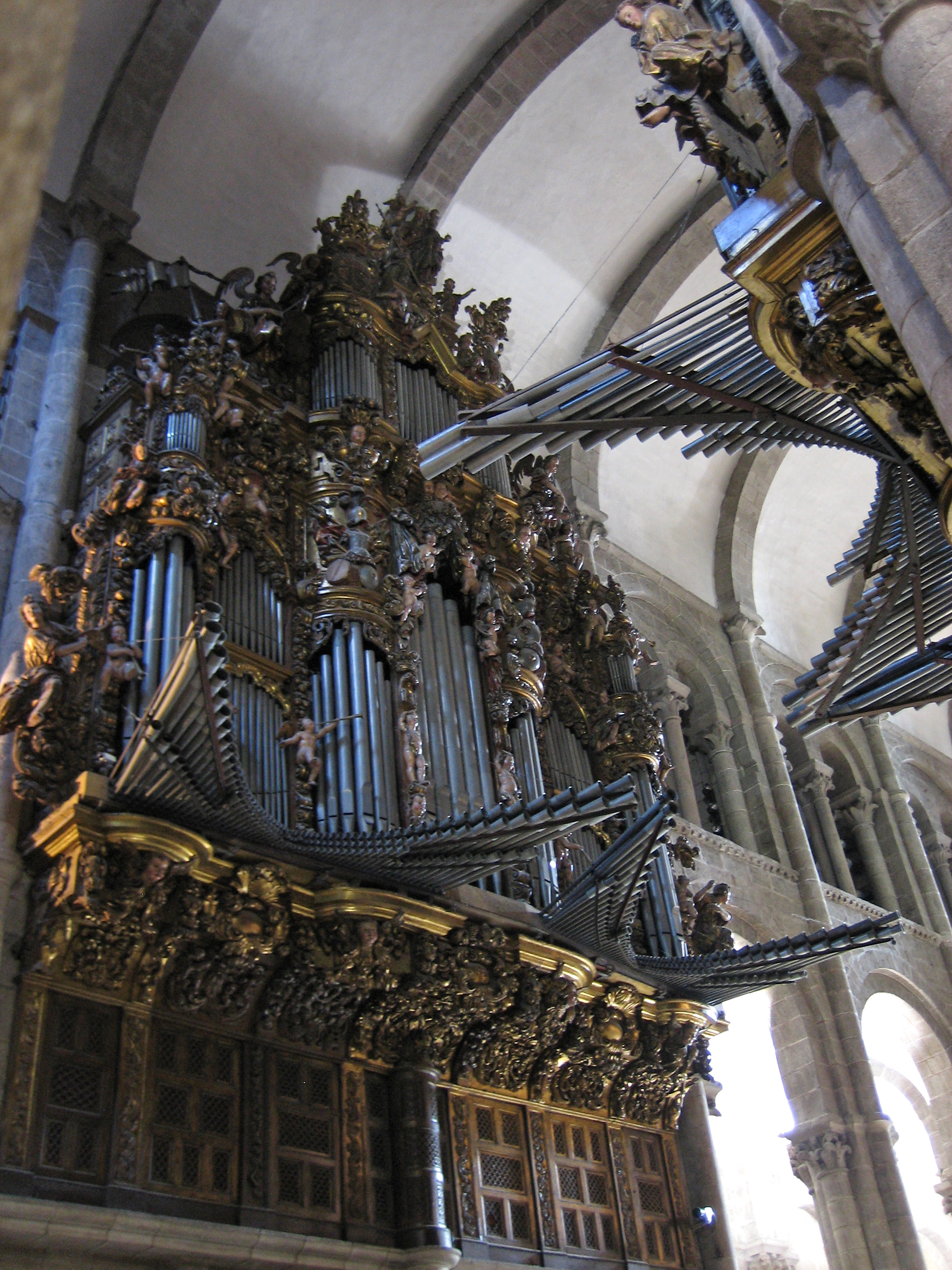 Santiago de Compostela. Cathedral organ.